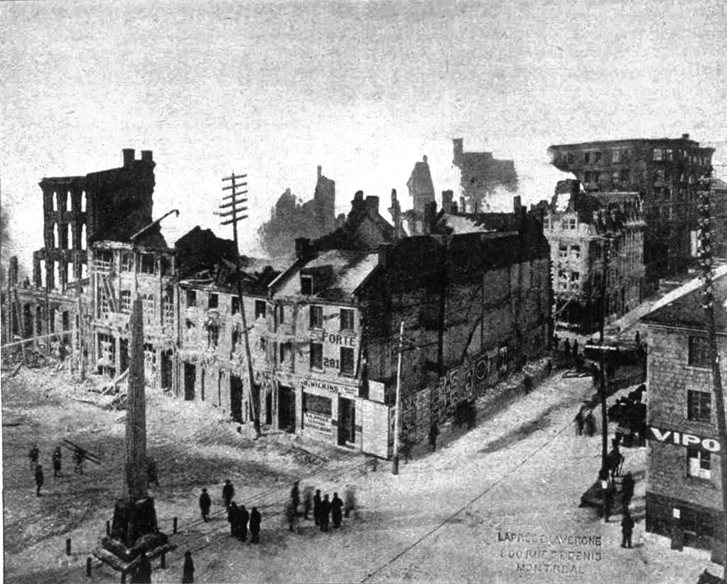 La grande conflagration du 23 janvier 1901 : Vue prise de la rue des Commissaires Le Monde illustré, vol. 17 no 875. p. 656 (9 février 1901) Photographie